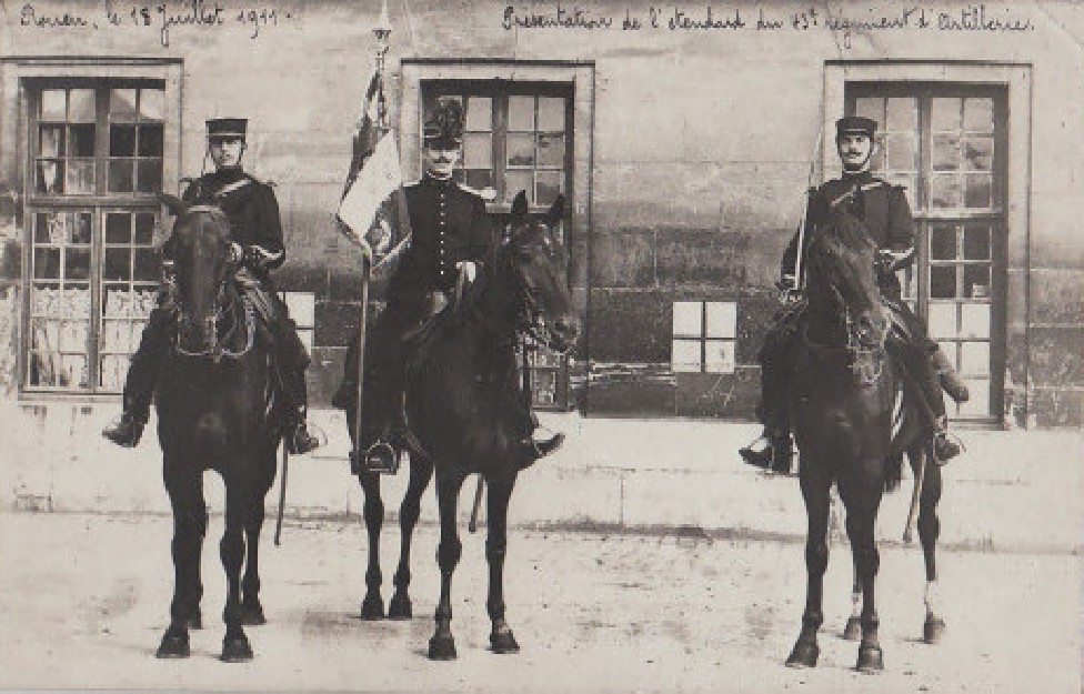 Porte-étendard du 43e régiment d'artillerie de campagne et sa garde montée, caserne Jeanne d'Arc Rouen, 1911